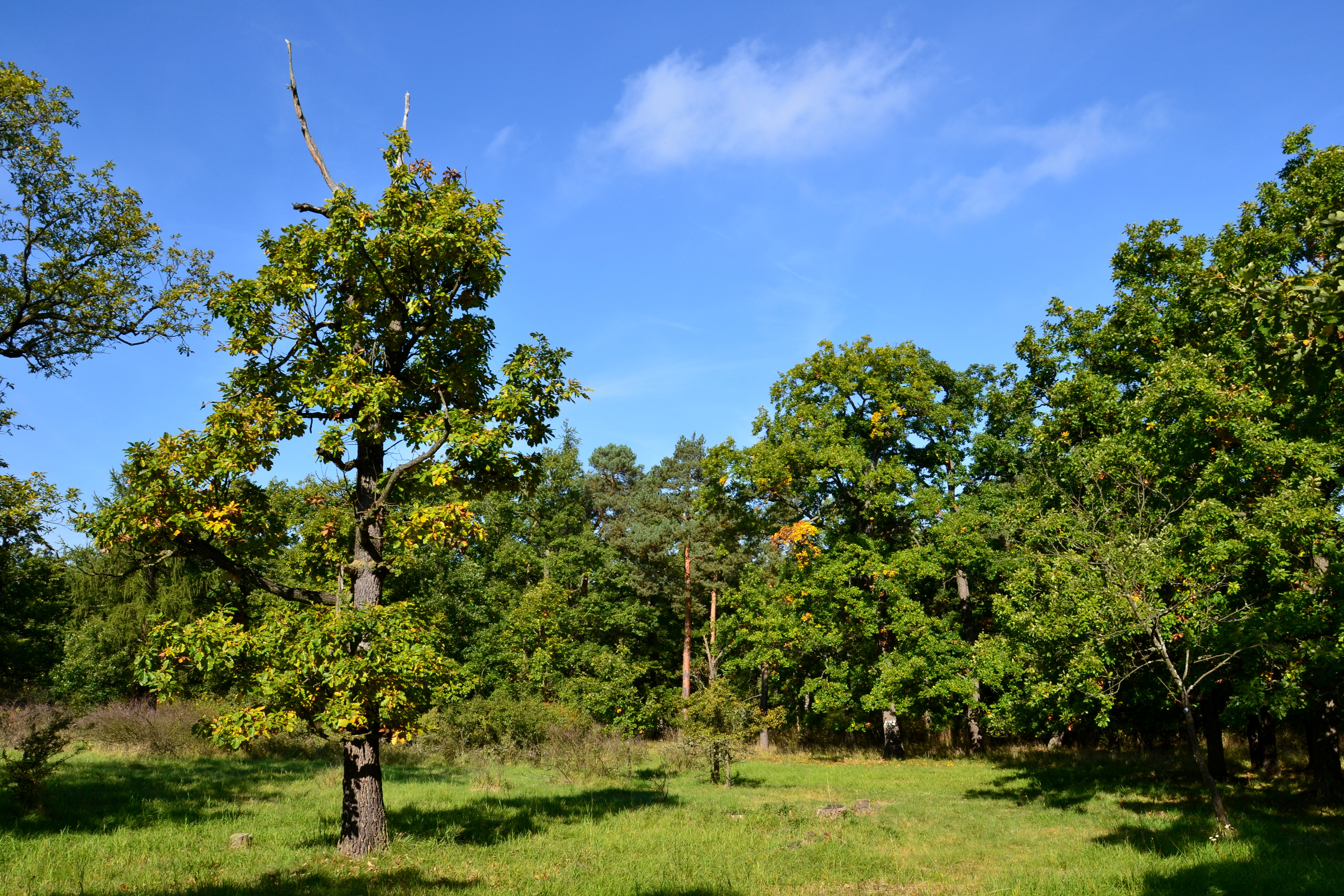 PR Dětaňský chlum